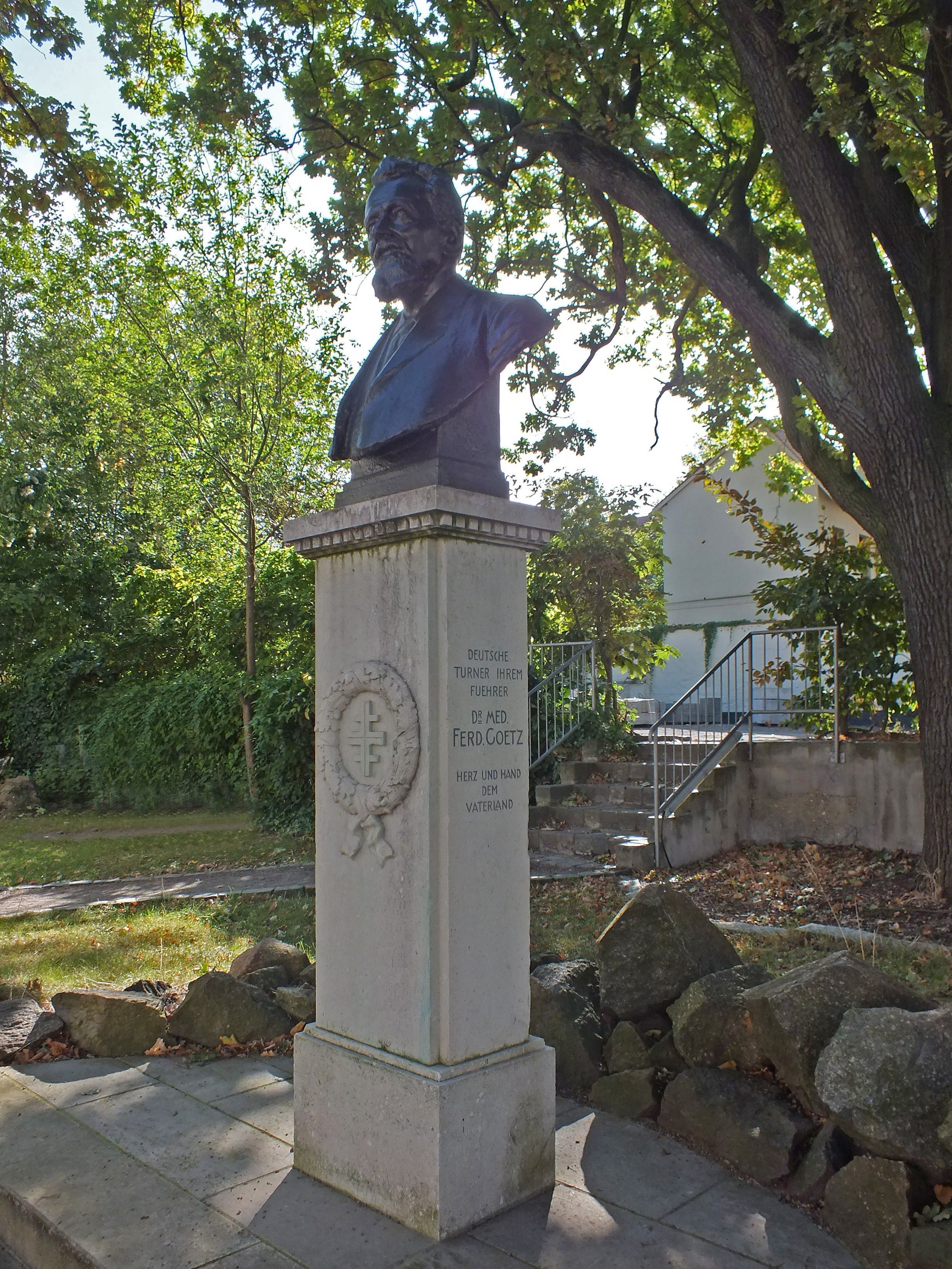 Ferdinand Goetz-Büste im Garten des Goetz-Hauses in Leipzig, geschaffen 1926 von Carl Seffner